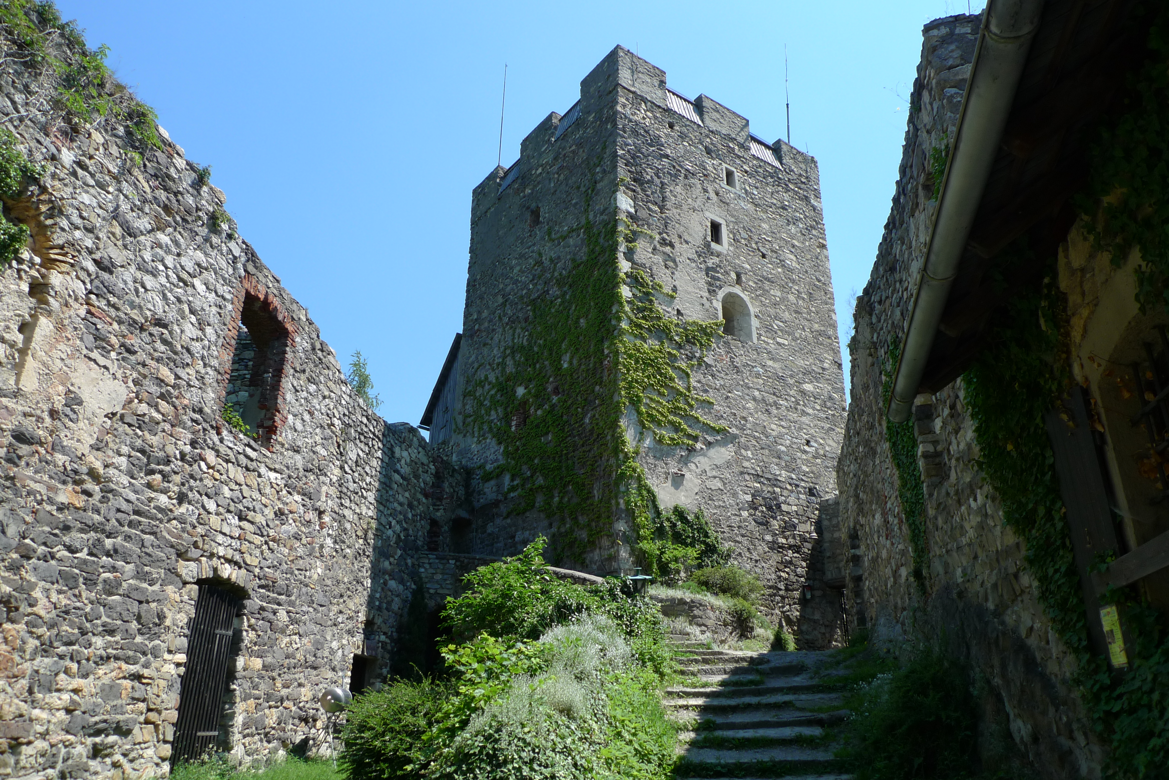 Innenbereich der Burgruine Gösting; eigene Aufnahme des Autors